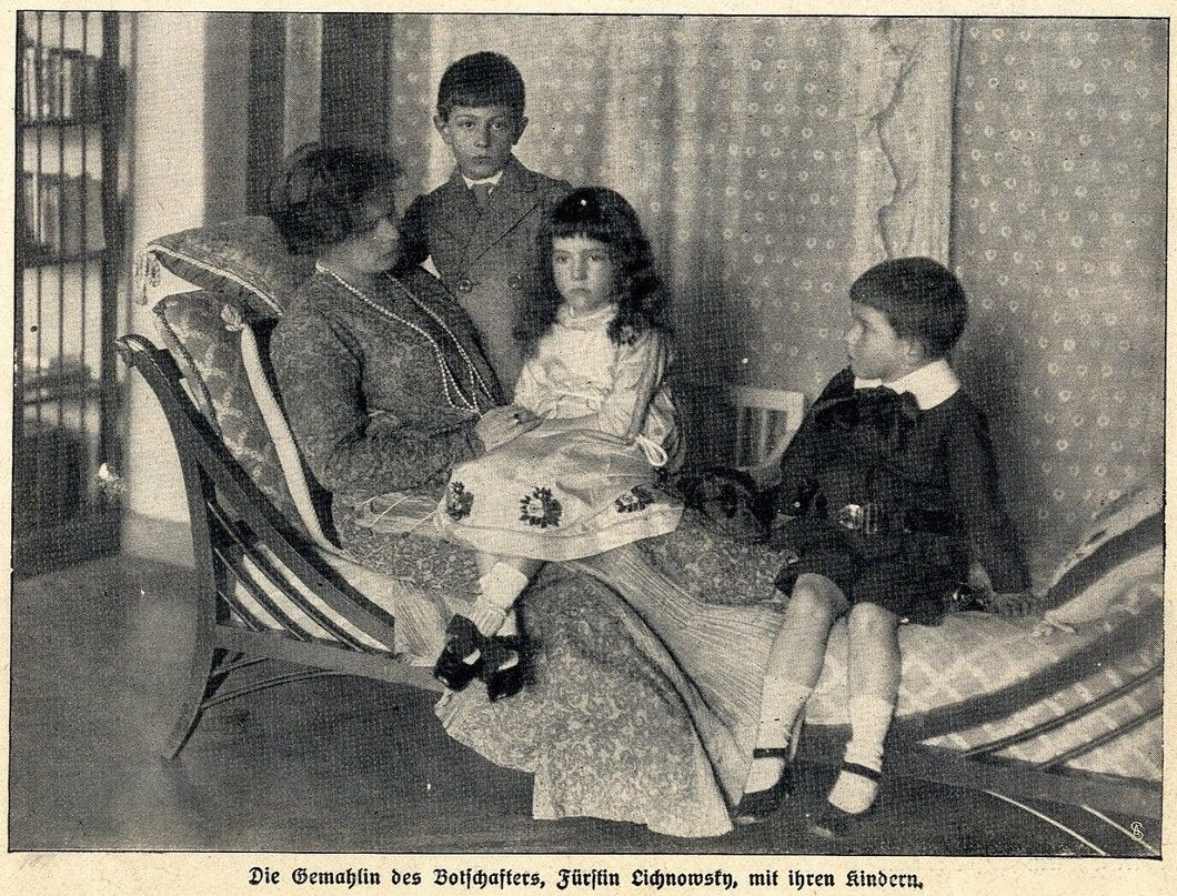 Mechtilde Lichnowsky mit ihren Kindern Wilhelm (* 1905), Leonore (* 1906) und Michael (* 1909), 1912